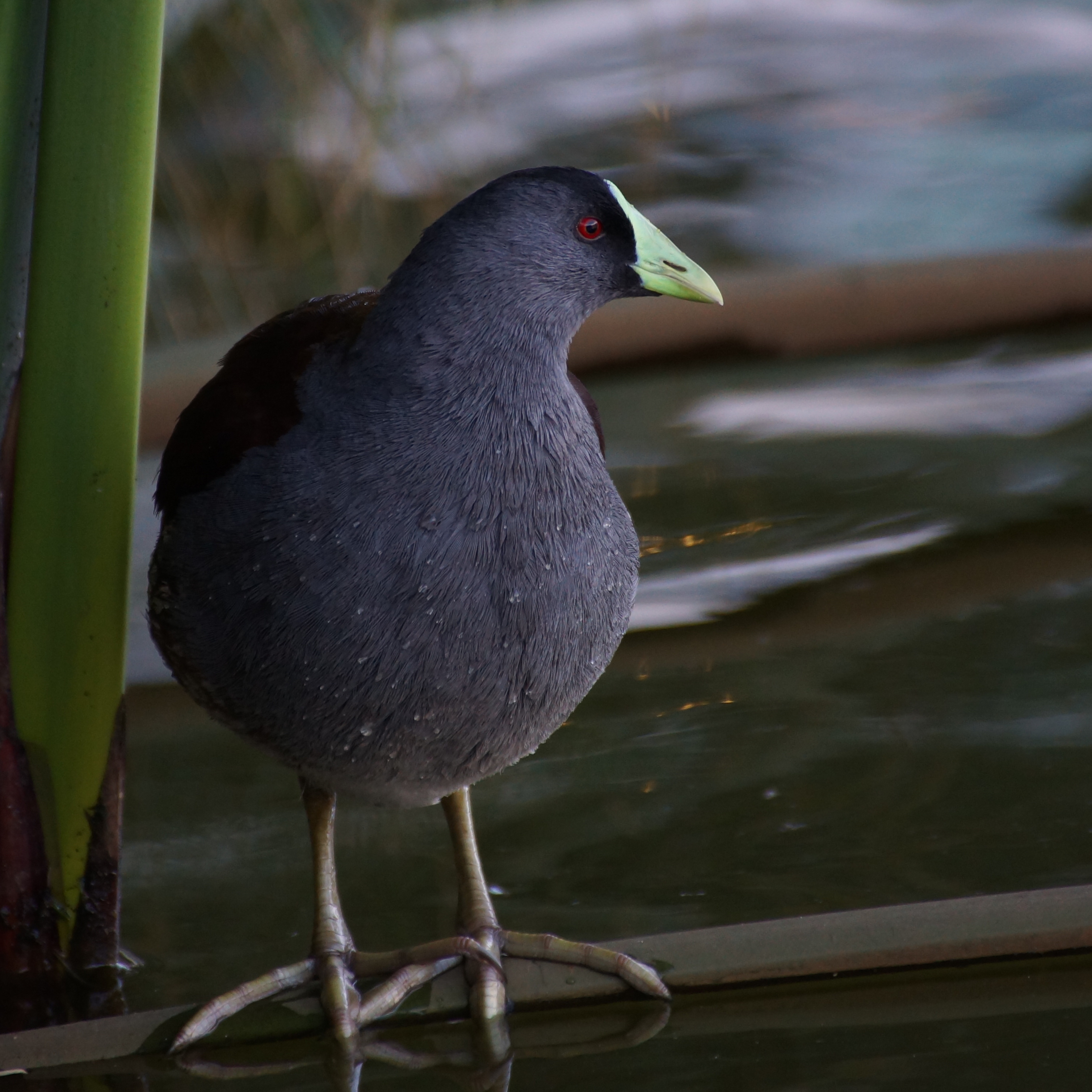 recorte de la imagen gallineta pintada (Gallinula melanops) de la subespecie bogotensis perchada en papiro en la sabana de Bogotá. límites Bogotá-Chia